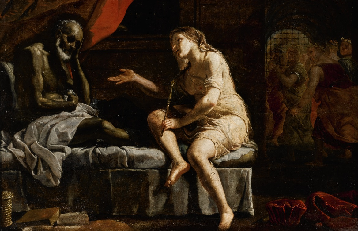 Mattia Preti (1613-1699) Boèce et la Philosophie, vers 1680 Huile sur toile - 185,4 x 254 cm La Valette, Palais magistral ou Palais du Grand Maître Photo : Sotheby’s